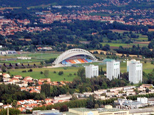 Stade Gabriel Montpied (Clermont-Ferrand, France)